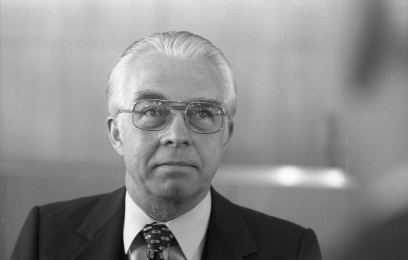 16.02.1983 Das Bundesverfassungsgericht in Karlsruhe verkündet das Urteil in der Organklage von vier Bundestagsabgeordneten gegen die Auflösung des 9. Deutschen Bundestages.